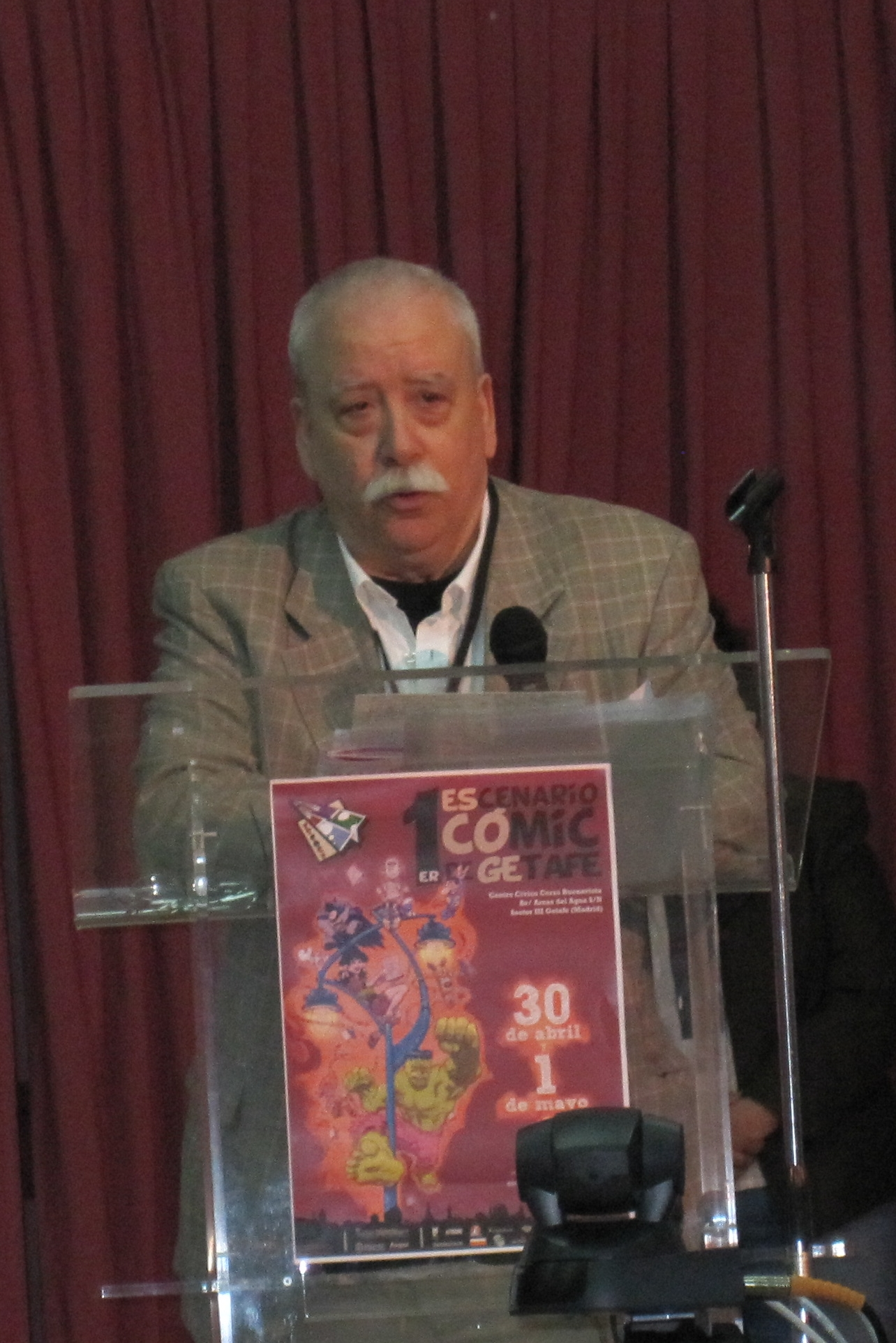 Antonio Martín, en el acto de entrega de la placa de la calle del dibujante Jan en el primer ESCOGE de Getafe en 2011.